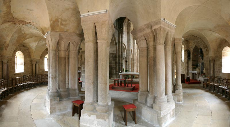 Intérieur de l'église de Bois-Sainte-Marie : déambulatoire